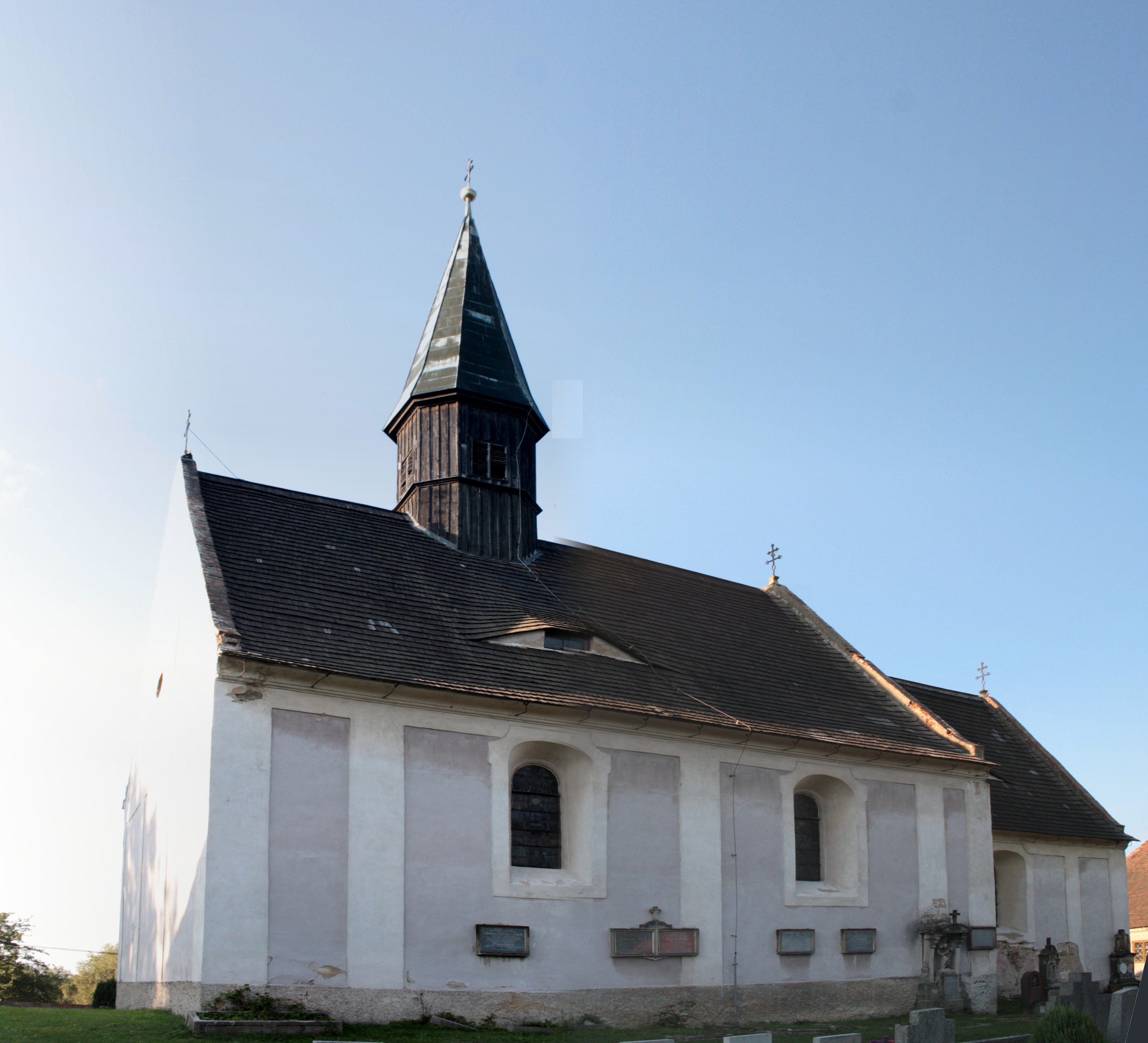 This photograph was taken with a DSLR from WMCZ's Camera grant. Pohled z jihu na kostel svatého Vavřince ve Vsi, součásti Černous v Libereckém okrese.